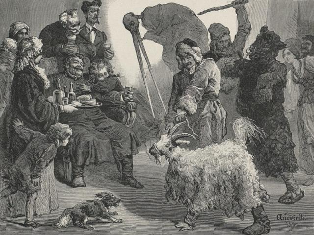 Andriolli. Wieśniaczy obrzęd "wodzenie kozy" przed polskim szlachcicem. Zachodnia Białoruś, XIX w.